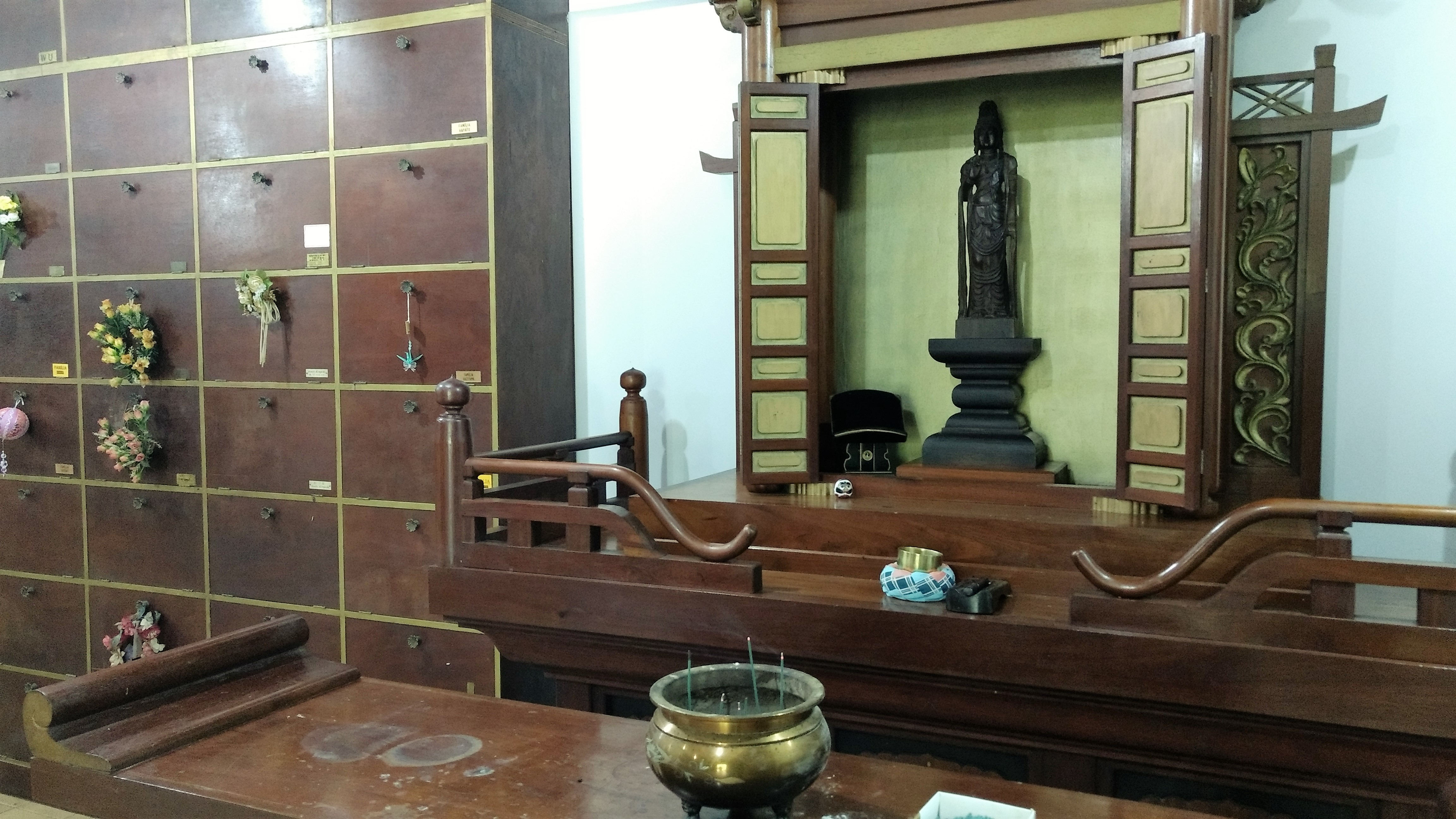 O Kinkaku-ji do Brasil é uma réplica do templo Kinkaku-ji japonês de mesmo nome construído no século XIV e assim como seu modelo, o Kinkaku-ji é entornado por um lago povoado por carpas coloridas (nishikigois). Fica no município de Itapecerica da Serra a trinta e três quilômetros da capital de São Paulo. Diferentemente do seu modelo japonês, o Kinkaku-ji do Brasil é um templo ecumênico e um cinerário, ao passo que o Kinkaku-ji japonês é um templo de orientação zen-budista.